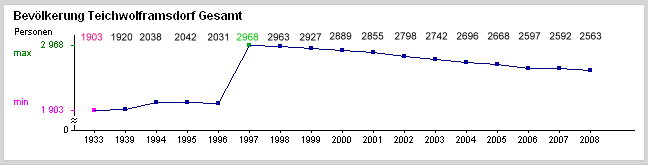 Bevölkerungsentwicklung in Teichwolframsdorf / Landkrs. Greiz